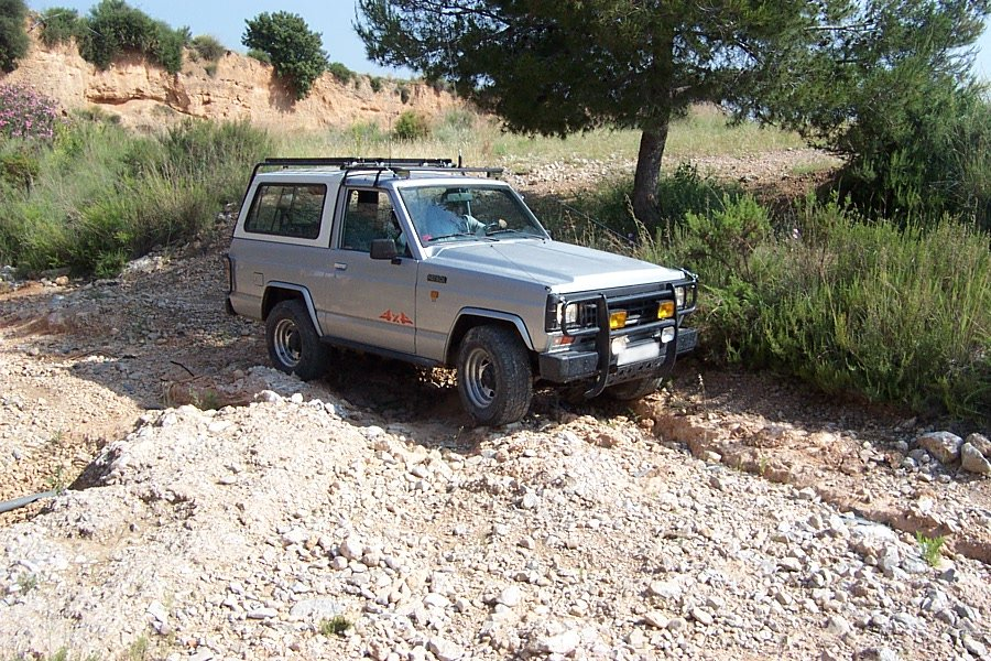 Nissan Patrol, modelo clásico.